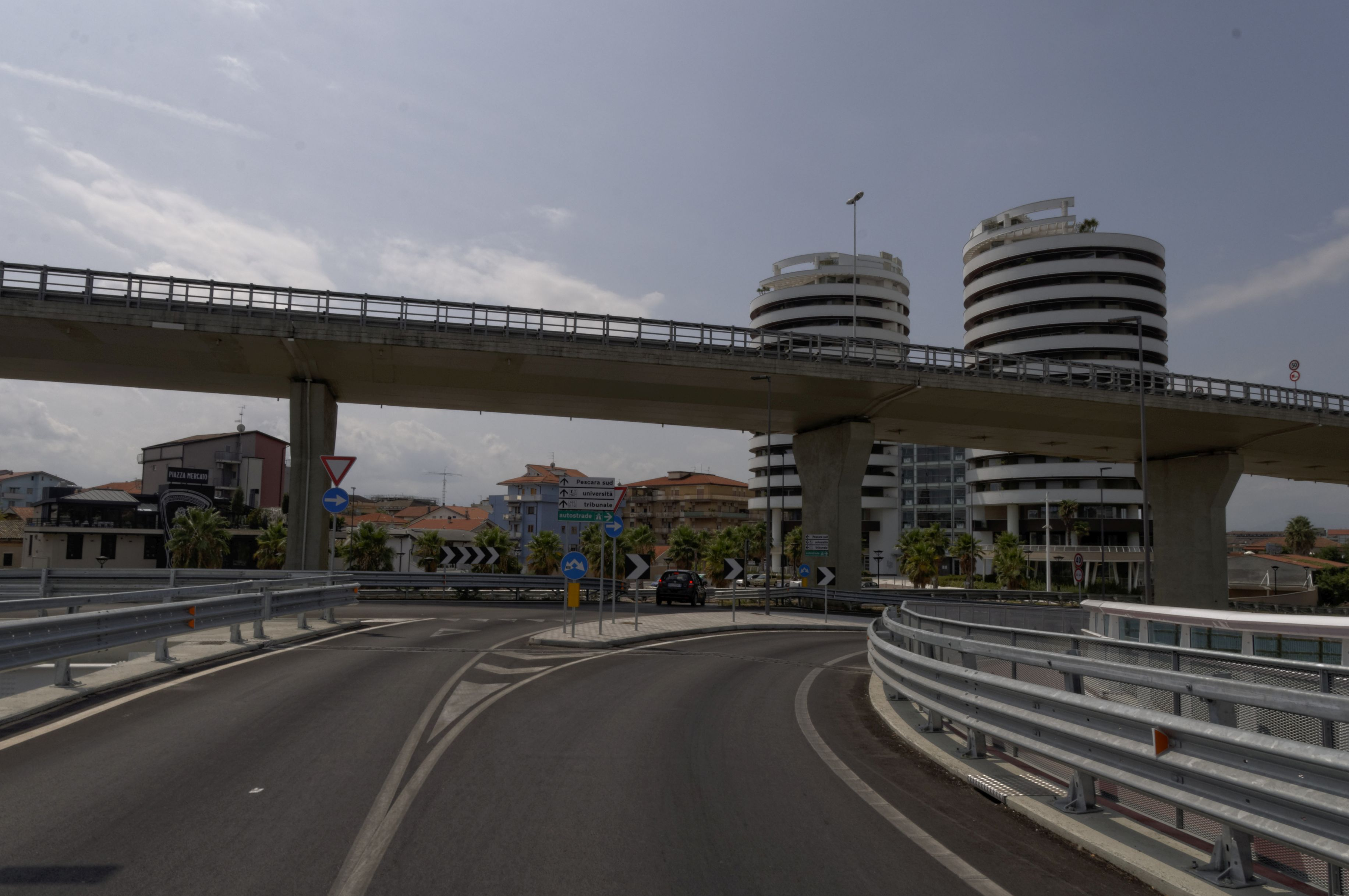 Pescara -Ponte Flaiano- 2017